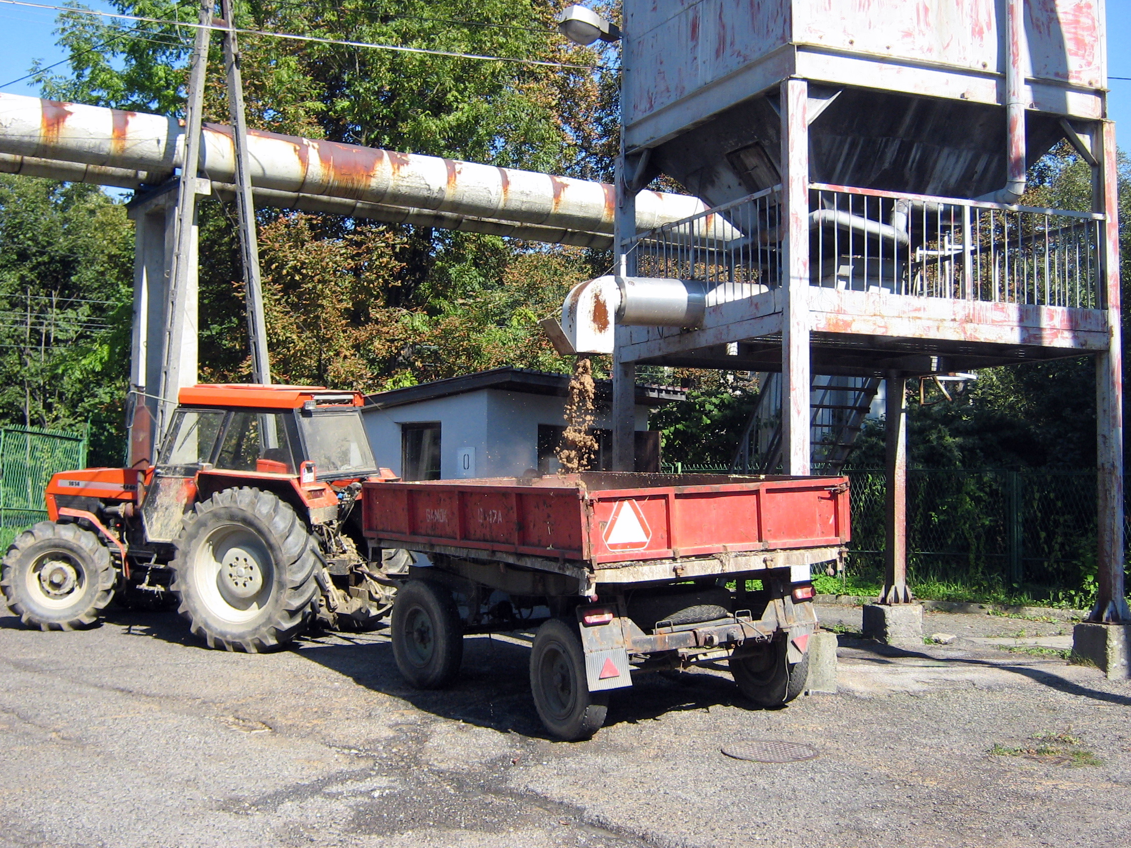 Verladung von Tebern zur Viehfütterung